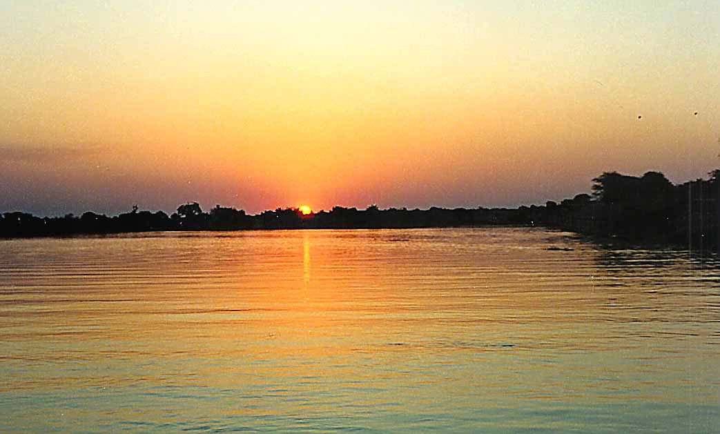 Namibien:Sonnenënnergang um Kunene Stroum